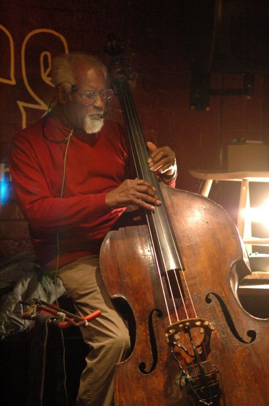 Cooleridge Goode